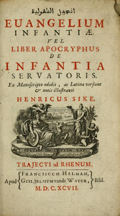 Henricus Sike (1697). Evangelium infantiae, vel Liber apocryphus de infantia Servatoris ex manuscripto edidit, ac latina versione et notis illustravit Henricus Sike. apud Franciscum Halmam, Guiljelmum vande Water.